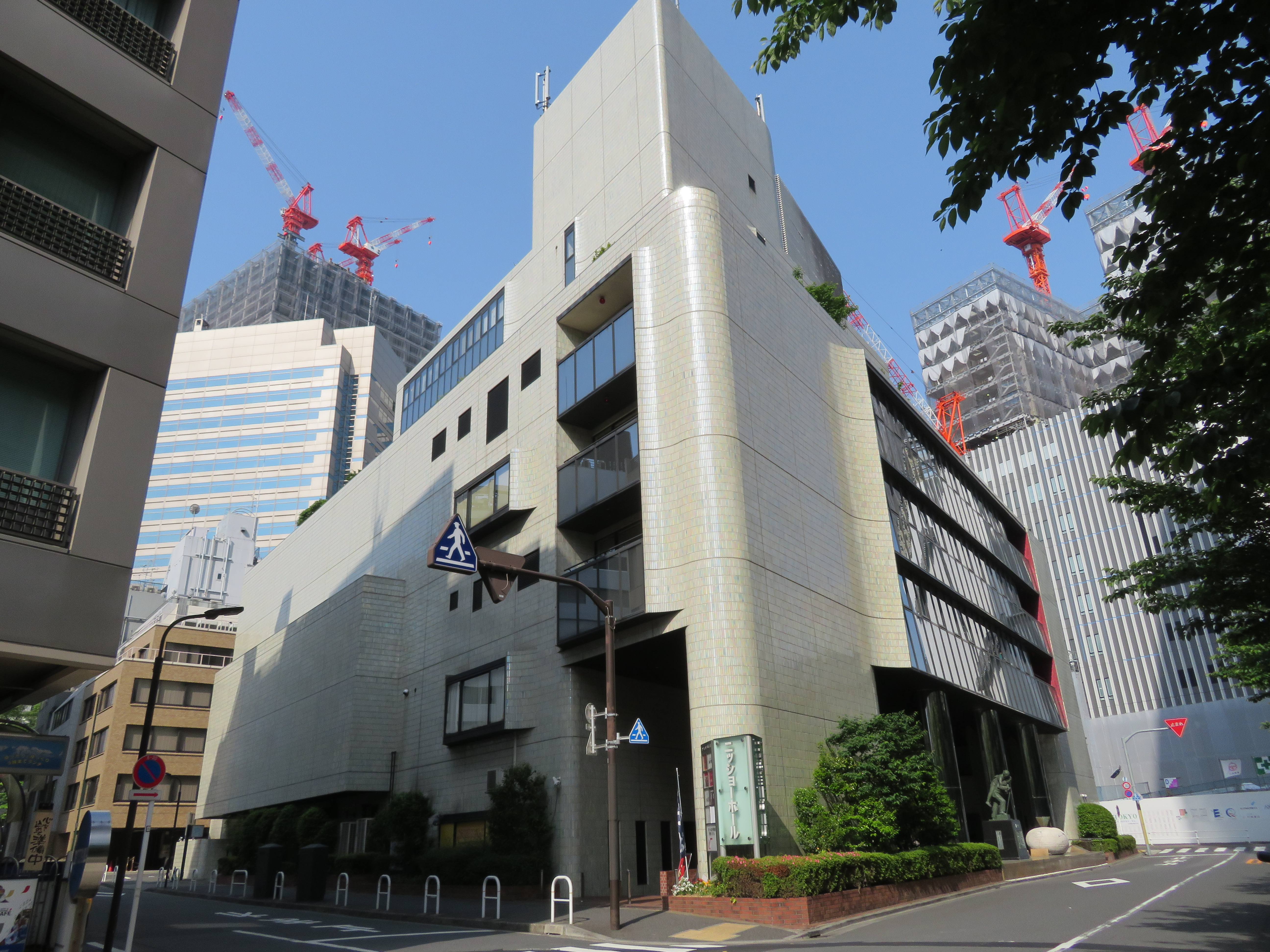 日本消防協会が所在する日本消防会館（ニッショーホール） Canon PowerShot SX720 HS